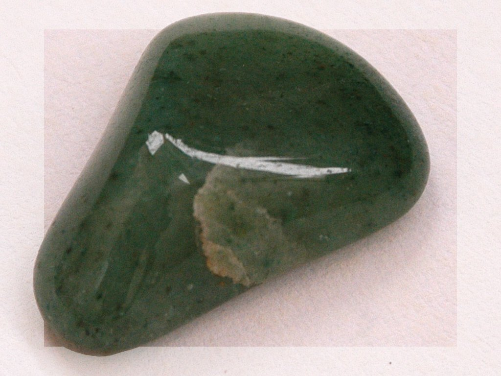 Geschliffener Aventurin